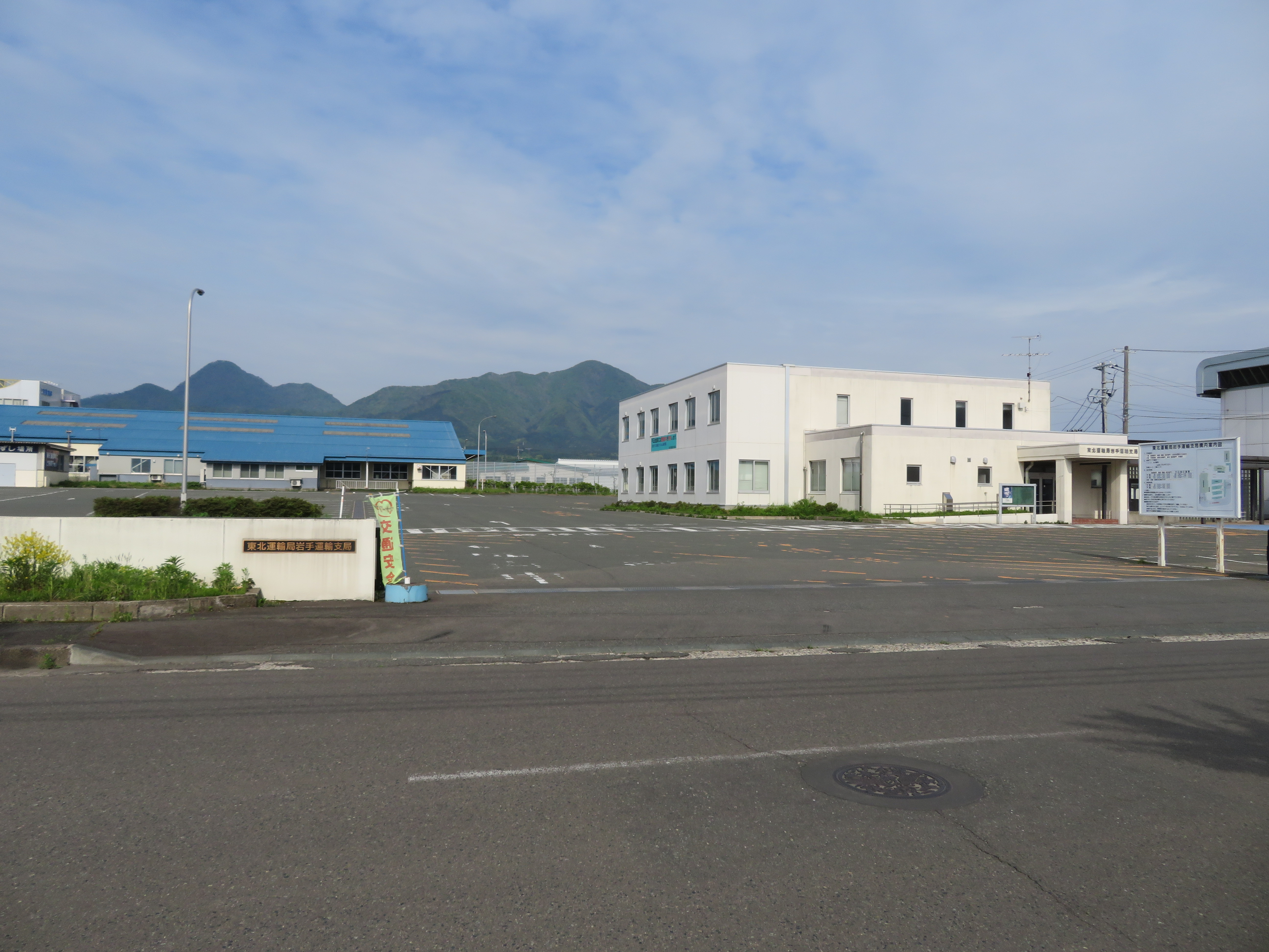 岩手運輸支局庁舎 Canon PowerShot SX720 HS